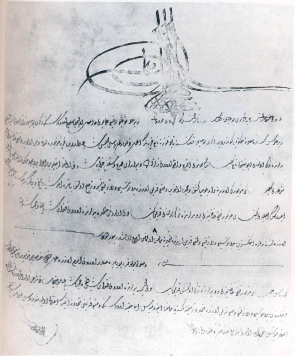 Султански ферман за строеж на църквата "Свети Николай" в Кожани.